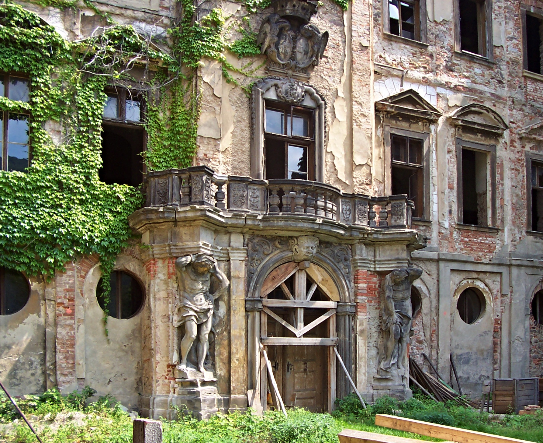 Zámek Jezeří, Jezeří čp. 1, Jezeří (Horní Jiřetín).